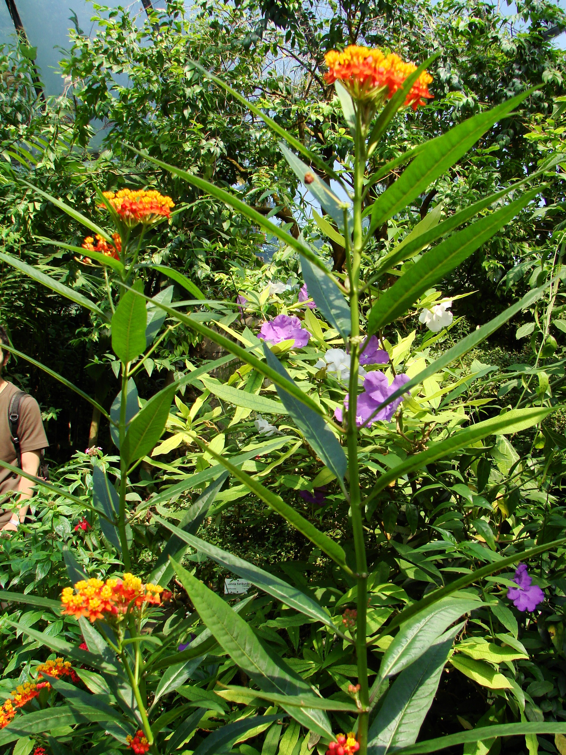 Jardin botanique de l'Université de Zurich (Suisse) : Asclepias curassavica L.